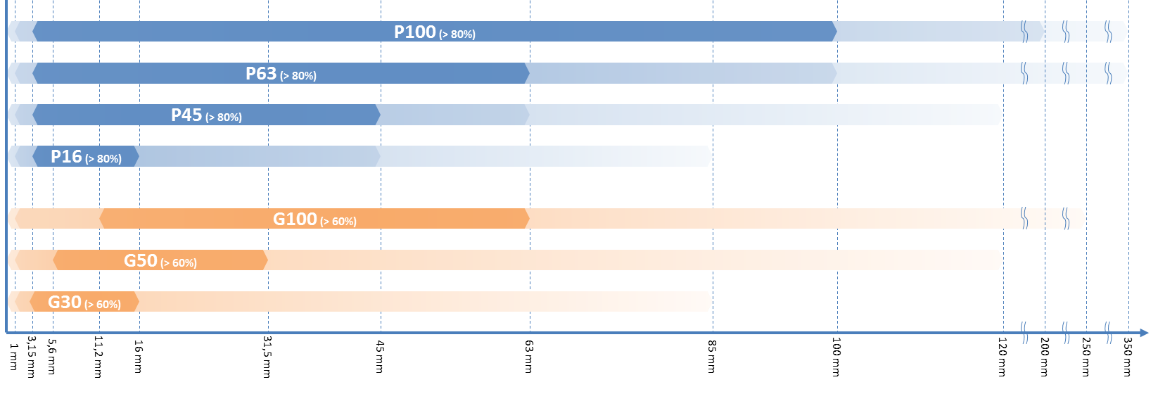 Größenklassen von Hackschnitzeln